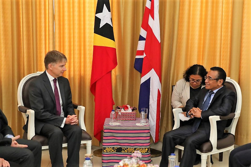 Präsident Francisco Guterres nimmt die Akkreditierung der neuen Botschafter in Osttimor entgegen: Finnland: Jari Sinkari Vereinigtes Königreich: Owen John Jenkins Polen: Beata Stoczynski Tetun: Prezidente Repúblika Francisco Guterres Lú Olo, ohin, simu karta kredensiál husi Embaixadór Finlandia, Jari Sinkari, Embaixadór Reinu Unidu, Owen John Jenkins, no Embaixadora Polónia, Beata Stoczynski atu hametin liután kooperasaun no amizade ho Timor-Leste.